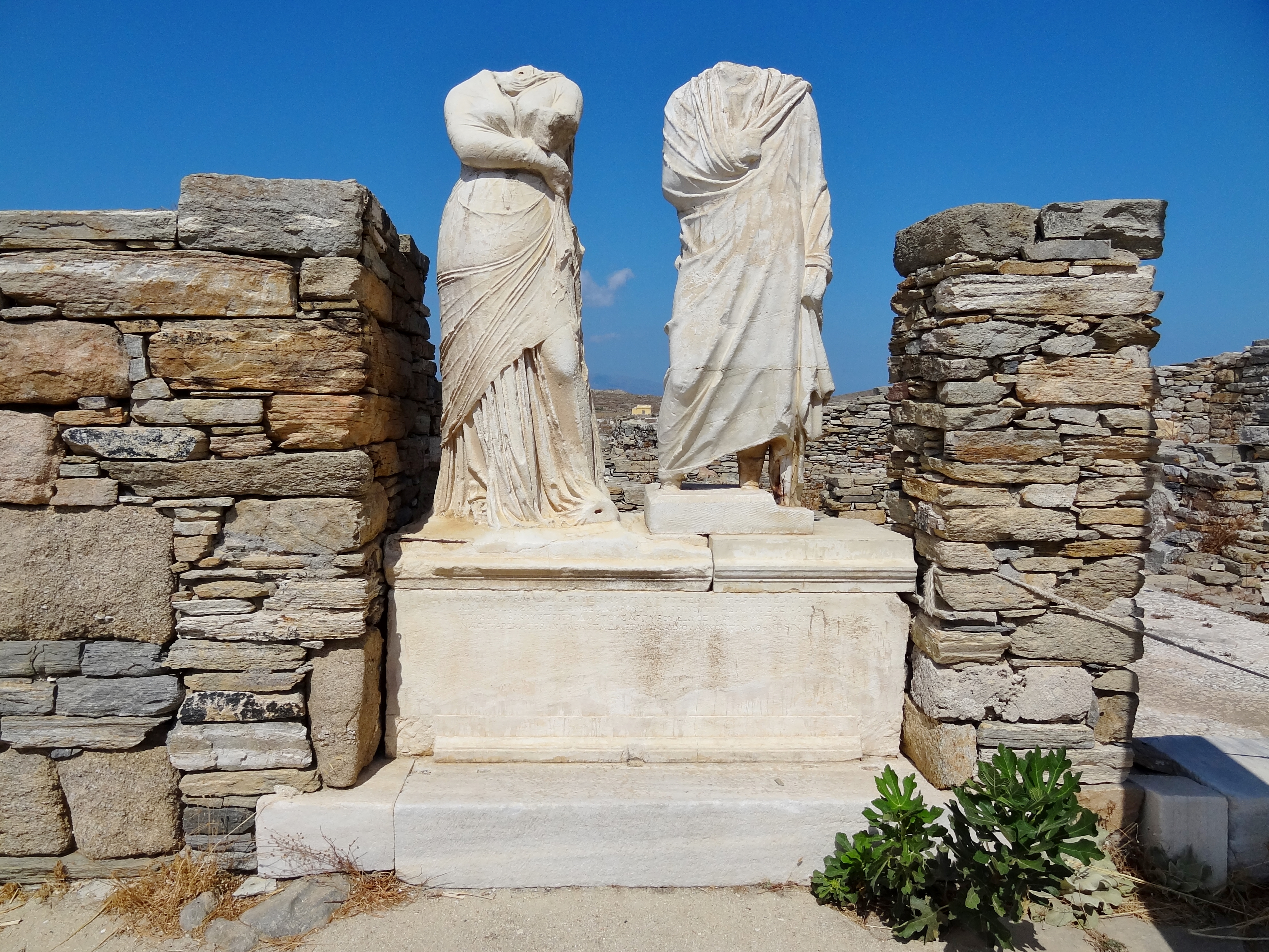 Statuen eines Ehepaars, der Athenerin Kleopatra und ihres Gatten Dioskurides (138/137 v. Chr.), im Haus der Kleopatra im Theaterviertel auf Delos, Kykladen, Griechenland